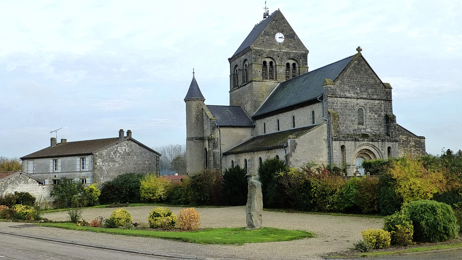 Place du 28 aout 1944 et parking de l'église dans le centre du village.